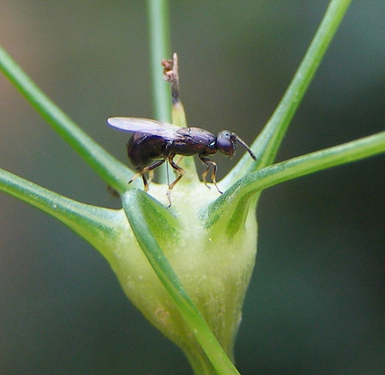 Eupelmus martellii femelle pondant dans une galle de Lasioptera carophila sur Foeniculum vulgare. ID L. Fusu MAJ.2015:Il s'agit plus probablement d'une femelle Eupelmus (Eupelmus) confusus Al Khatib sp. n. Réf. : Al khatib, F.; Fusu, L.; Cruaud, A.; Gibson, G.; Borowiek, J.-Y.; Ris, N.; Delvare, G. 2014, An integrative approach to the species discrimination in the Euplemus urozonus complex (Hymenoptera, Eupelmidae), with the description of 11 new species from the Western Palaearctic. Systematic Entomology 39(4):828